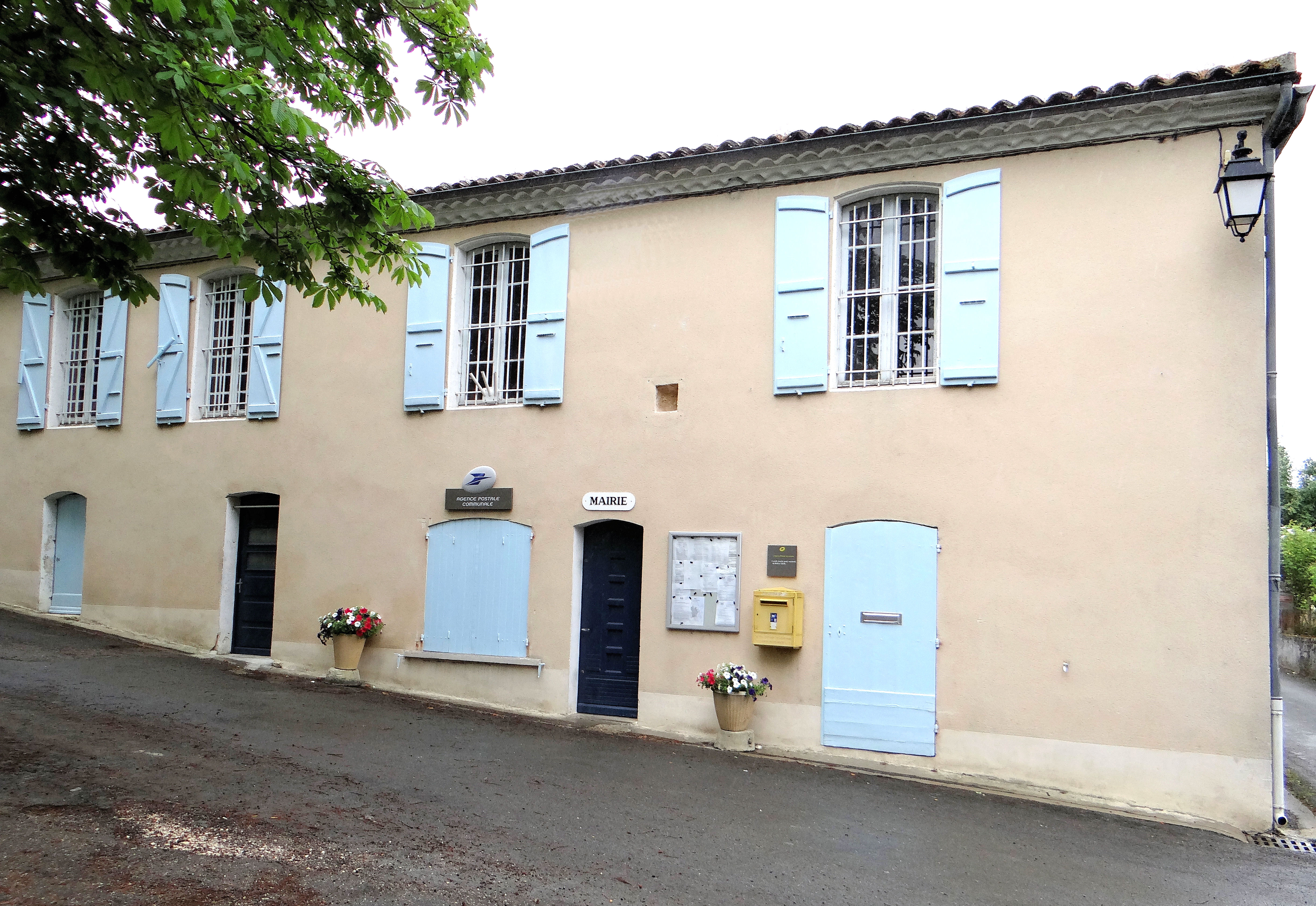 Tournecoupe - Mairie